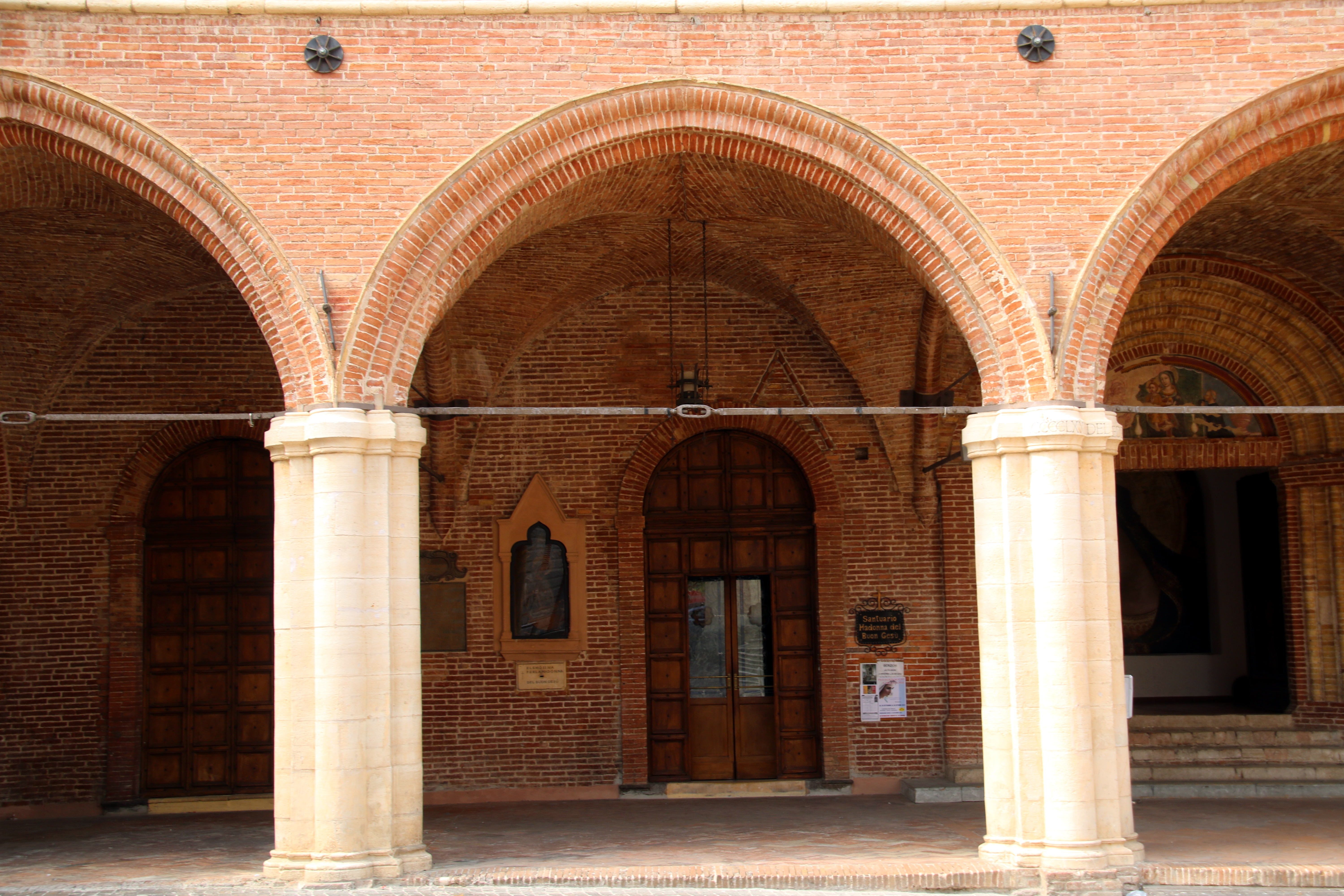 Spedale Santa Maria del Buon Gesù (Pinacoteca civica "Bruno Molajoli") This is a photo of a monument which is part of cultural heritage of Italy.